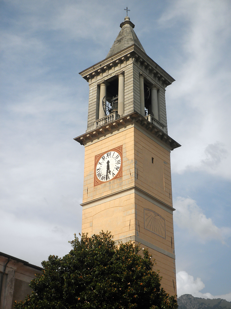 Porlezza, campanile della chiesa di San Vittore